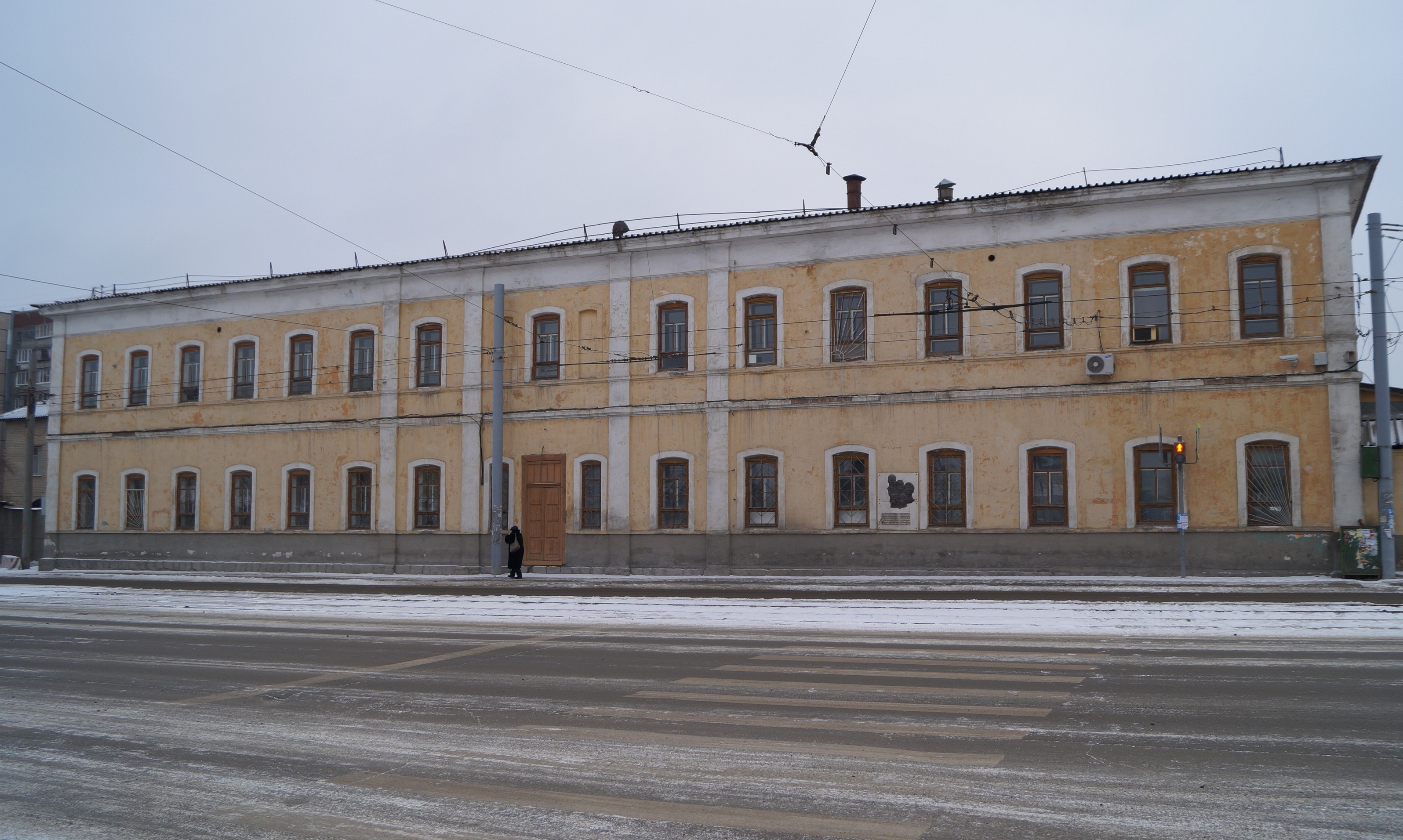 Площадь Павших революционеров в Челябинске. "Белая казарма", ныне размещается подразделение военного госпиталя.